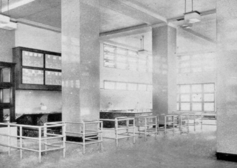 新装なった新名古屋駅改札口